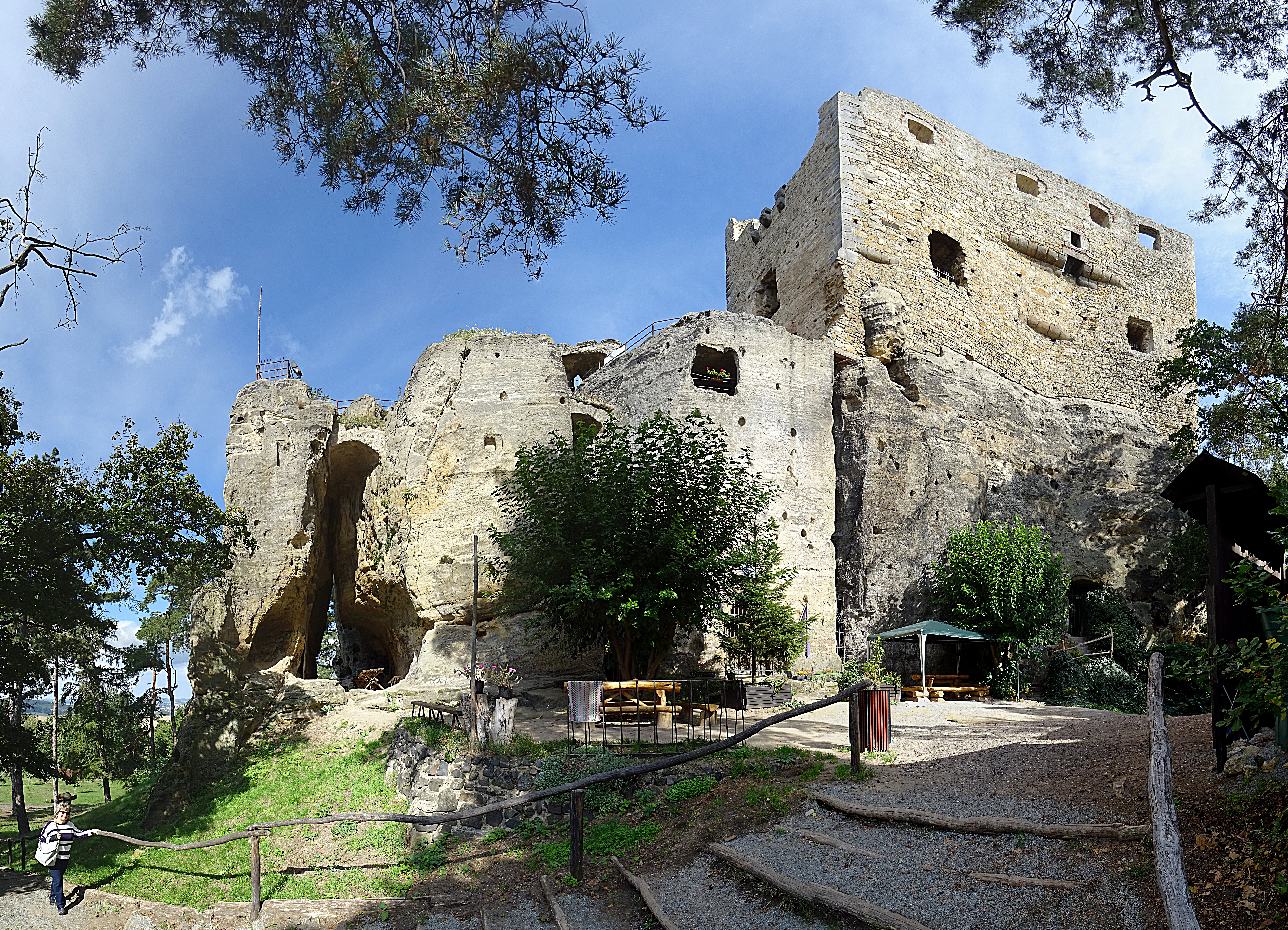 Felsenburgruine Valečov (Boseň) von Süden